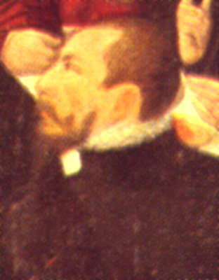 Lucas Cranach d. J. als Mundschenk Ephitaph Joachims von Anhalt in Desssau Mildensee gemalt 1565 gemeinfrei